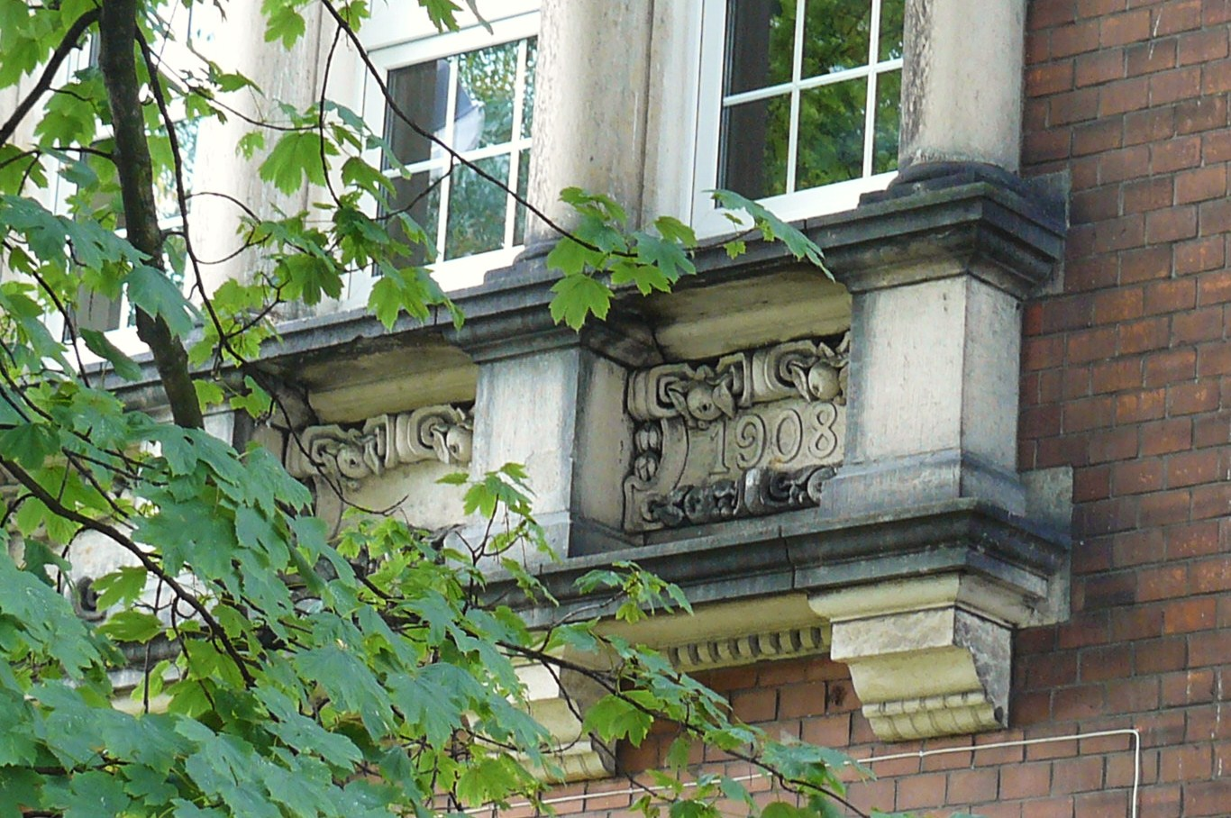 Poznań Łazarz - zespół zabudowań szkolnych (zabytek nr A 258).